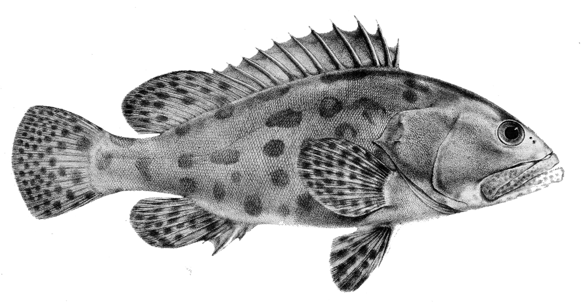 Epinephelus tukula